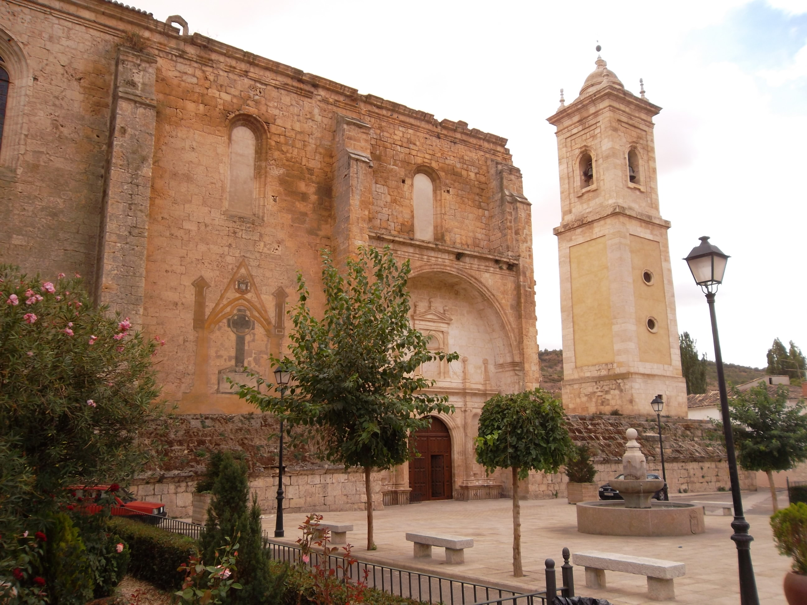 Tendilla-La iglesia parroquial, está dedicada a la Virgen de La Asunción y se construyó en los siglos XVI a XVIII, todavía sigue inacabada.